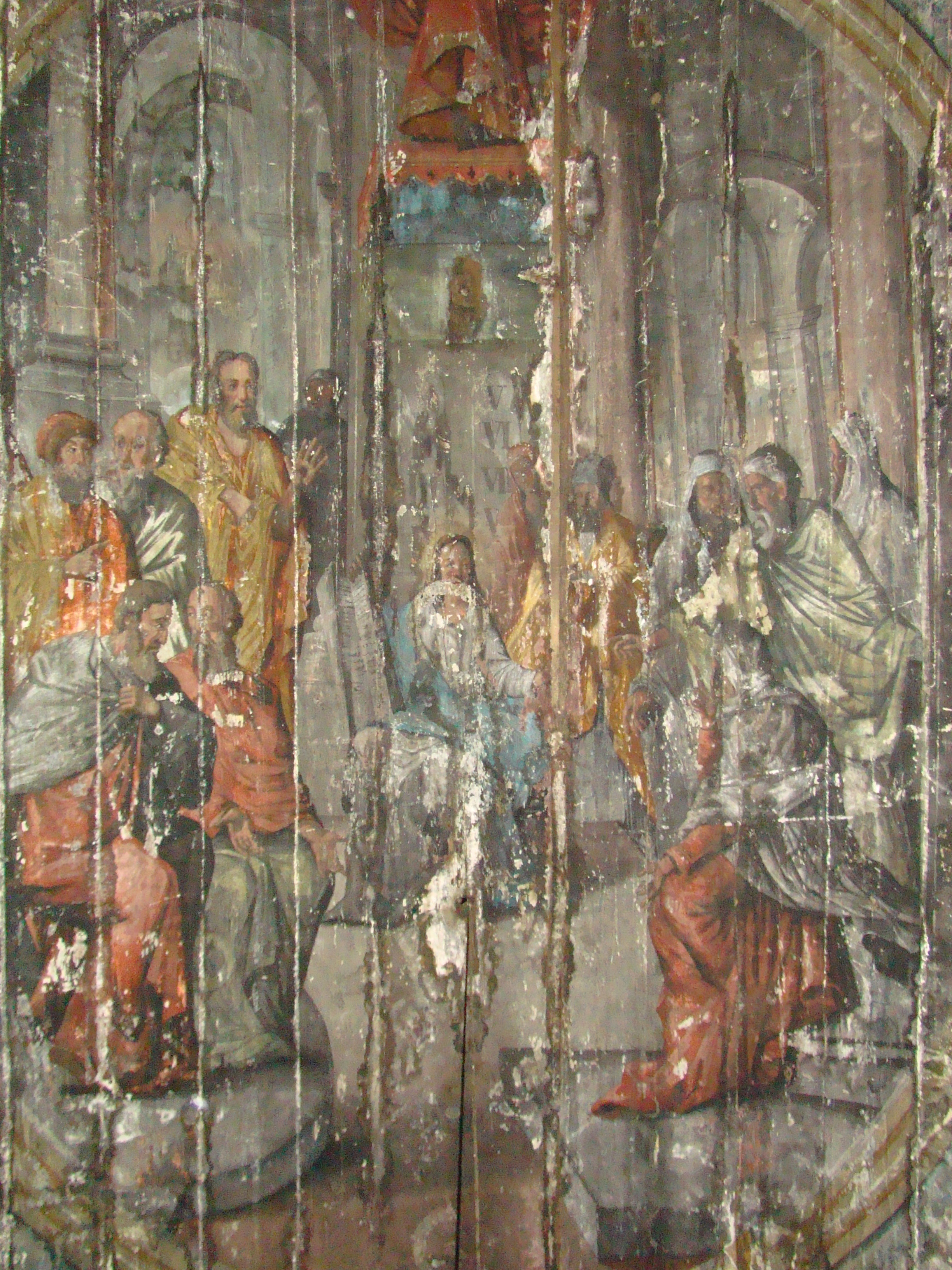 Biserica de lemn "Sfântul Nicolae" (a Nistoreştilor) , oraş SĂLIŞTEA DE SUS